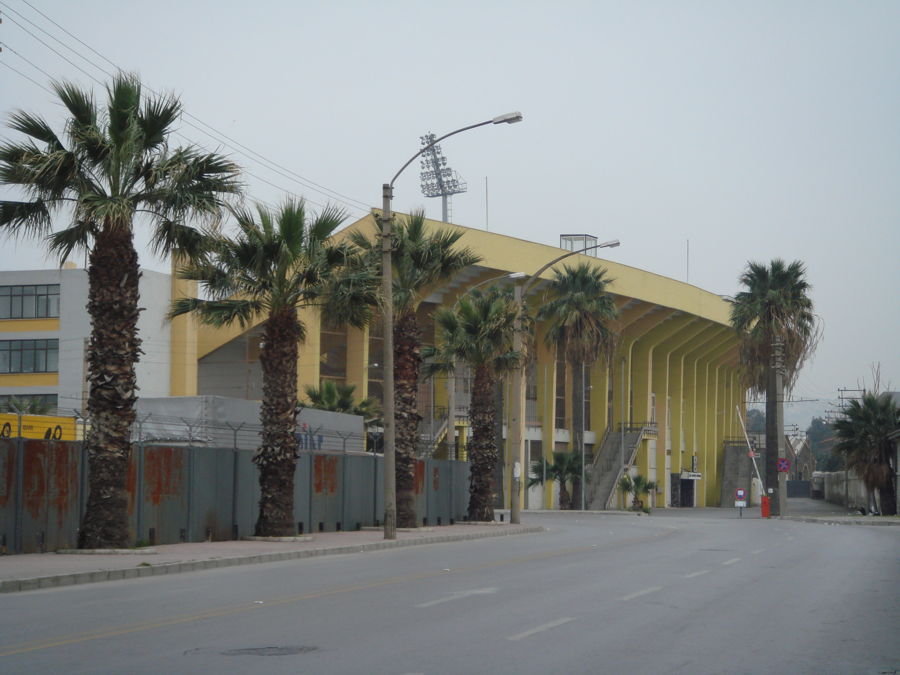 Das Alsancak Stadı befindet sich unweit von der Bucht in einem Gewerbegebiet der Innenstadt. Es wird trotz seines Alters von den Fans wegen seiner zentralen Lage geschätzt.